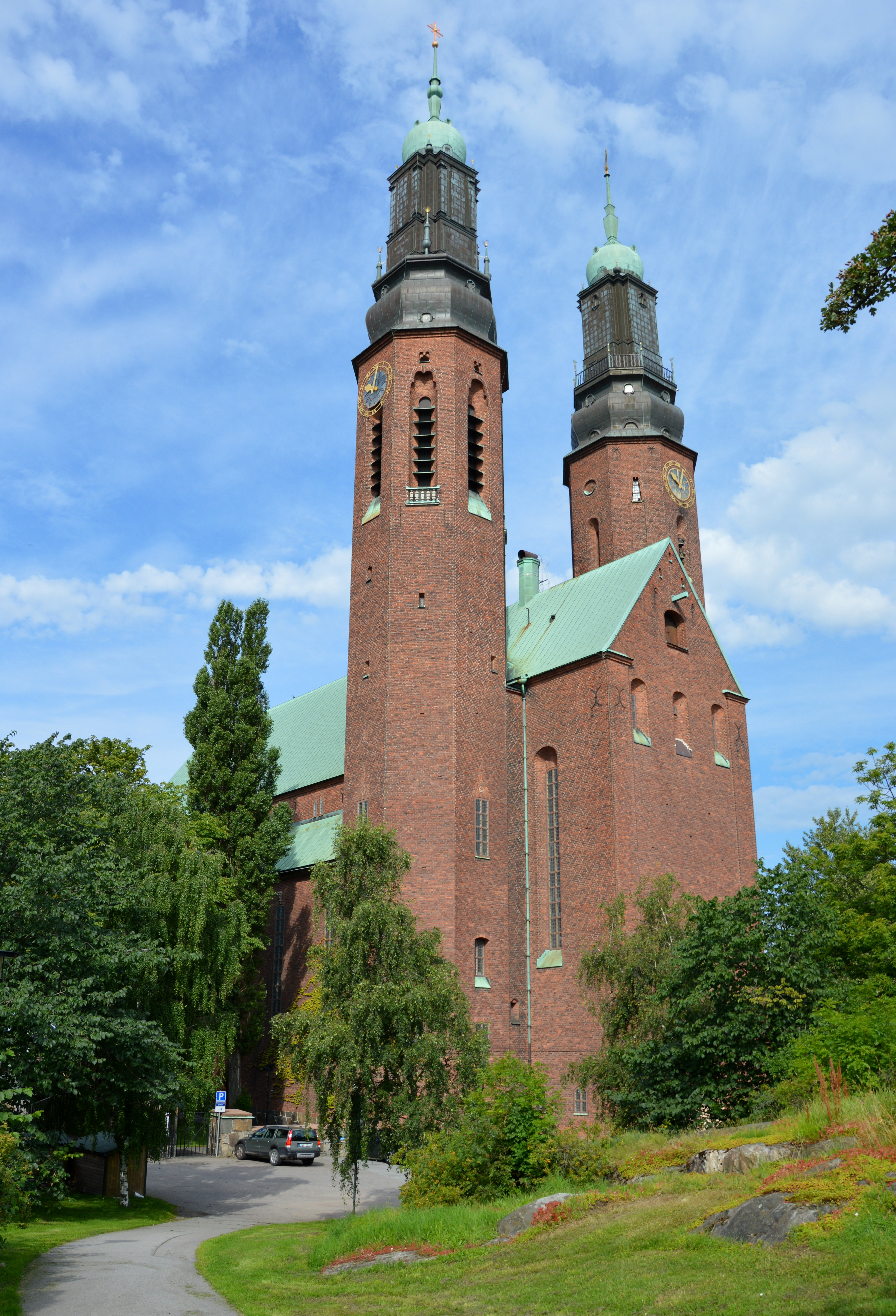 Högalids Kyrka, Södermalm